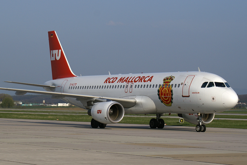 LTU Logojet RCD Mallorca